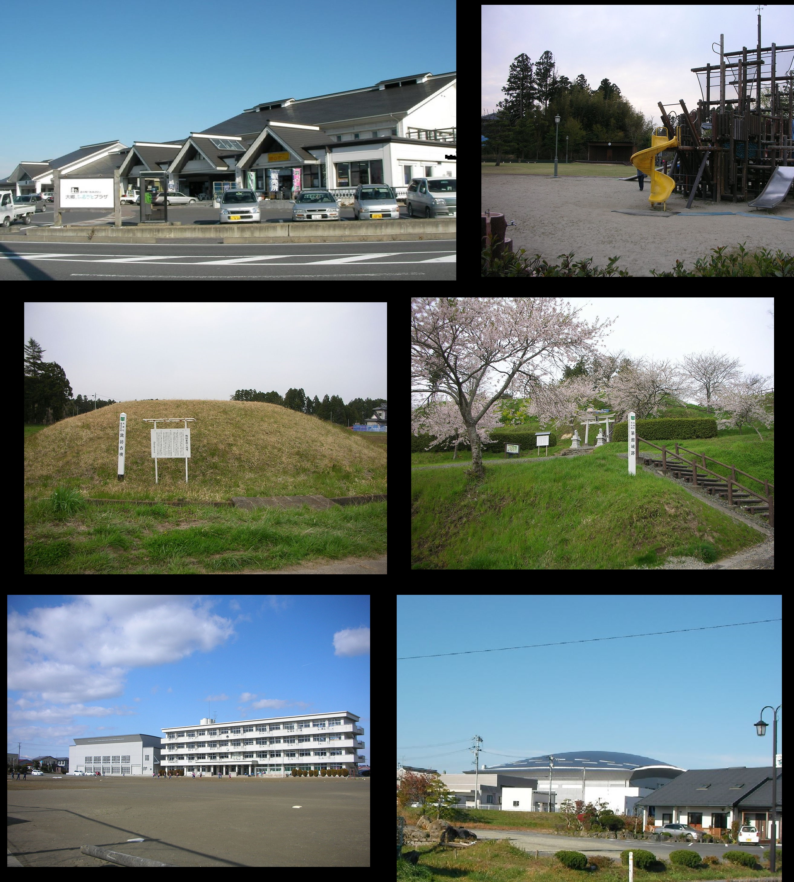 宮城県黒川郡大郷町